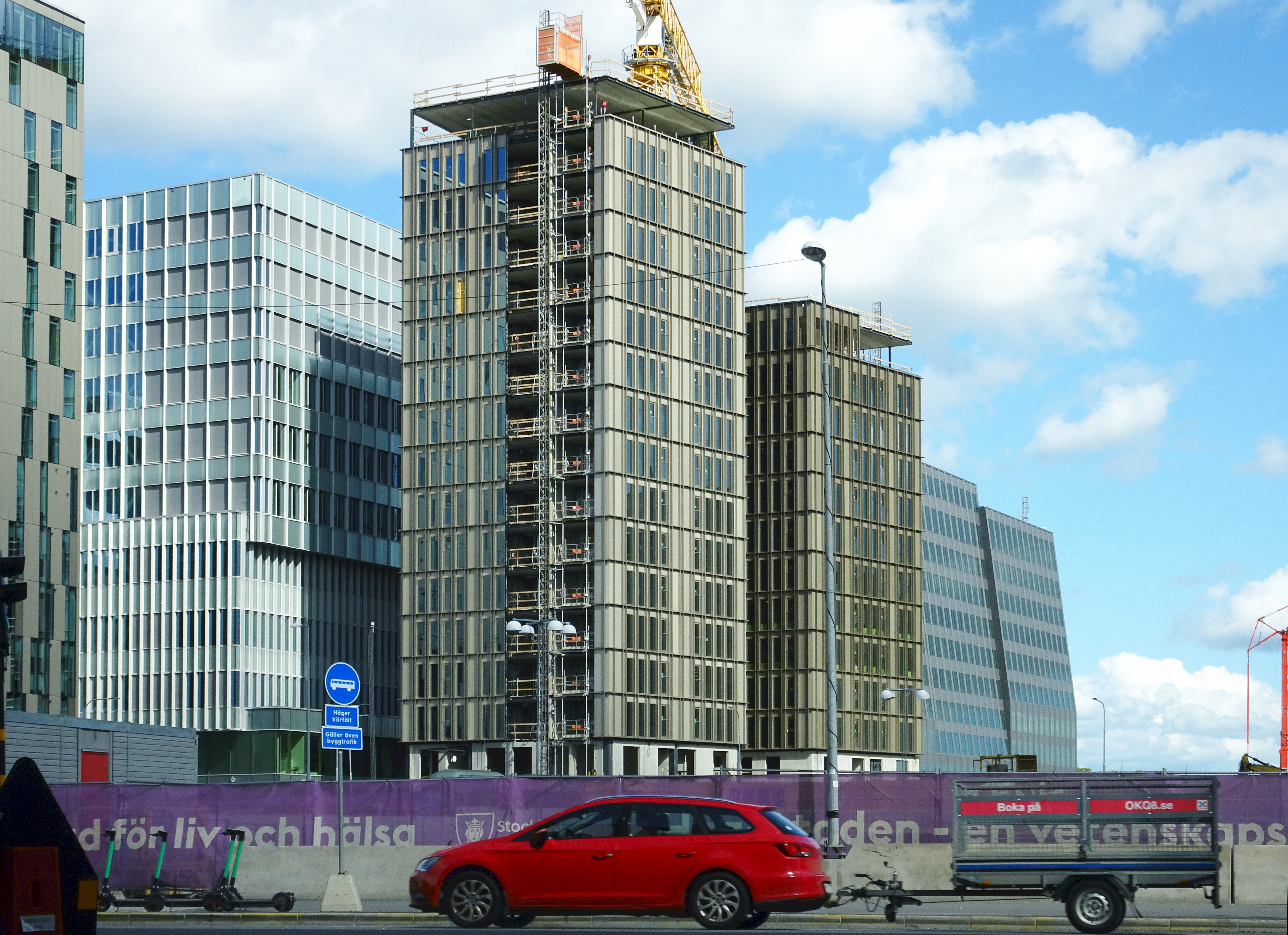 Fastigheten Oxford 1 och Coimbra 1. De två första bostadshusen i "Kvartetten". Fastigheten Bolongna 1 och Humboldt 1 är fortfarande obebyggd. Arkitekt Wingårdhs Arkitektkontor